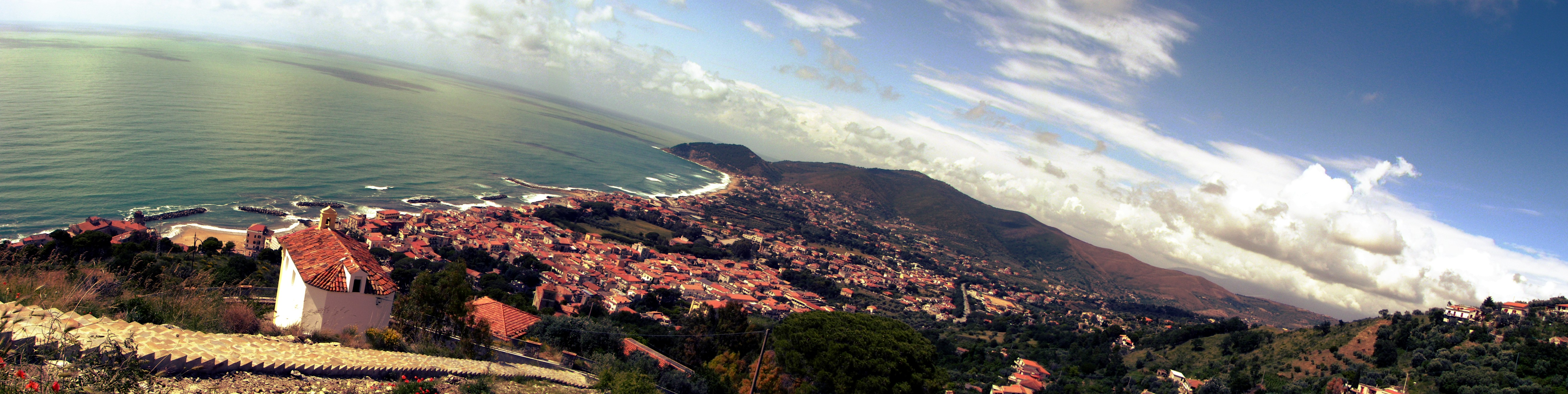 Foto panoramica